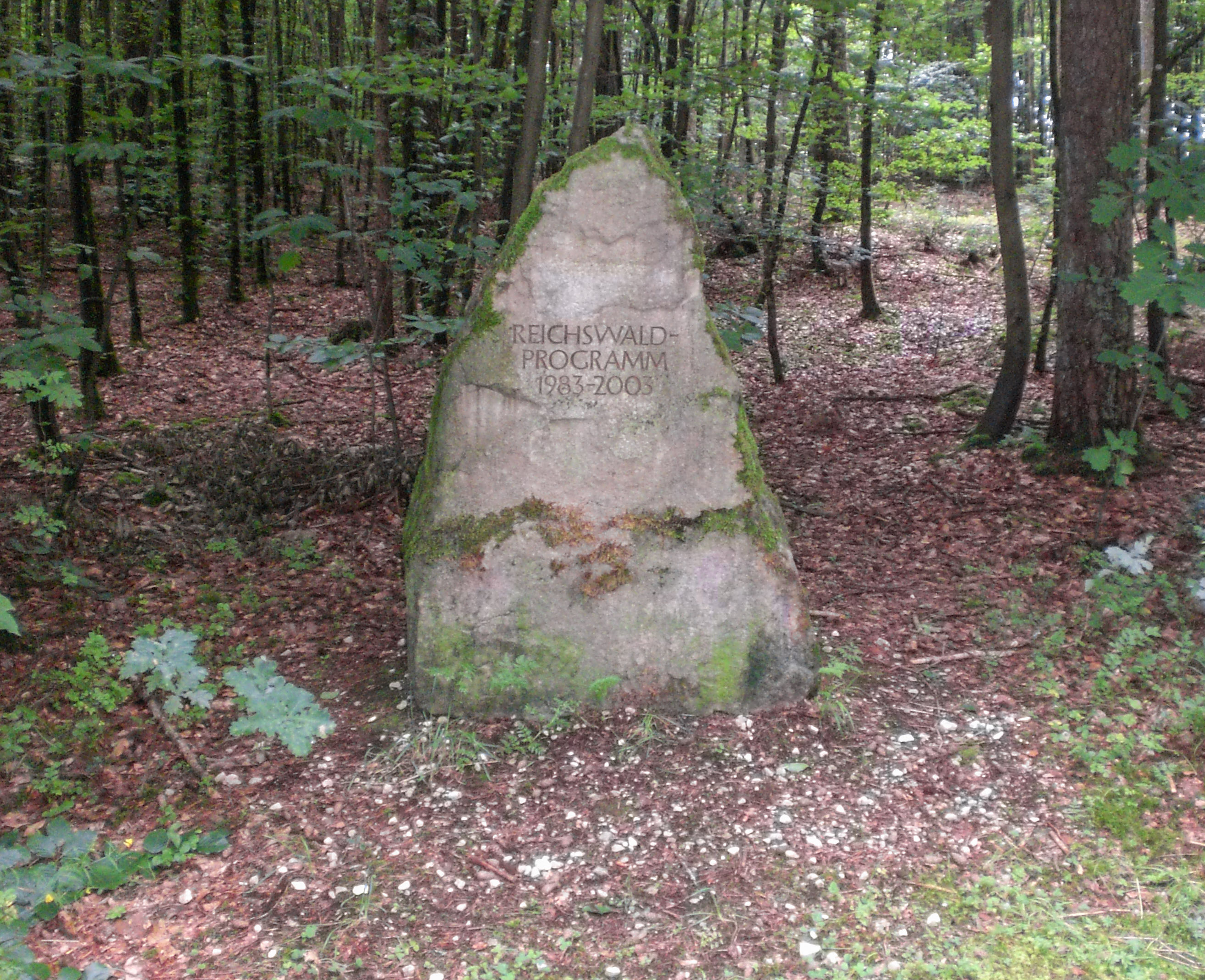 Reichswald Denkmal bei Feucht